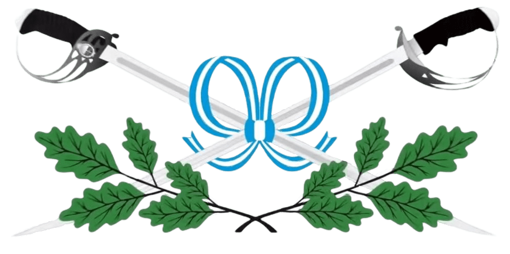 Escudo de la Gendarmería Nacional Argentina